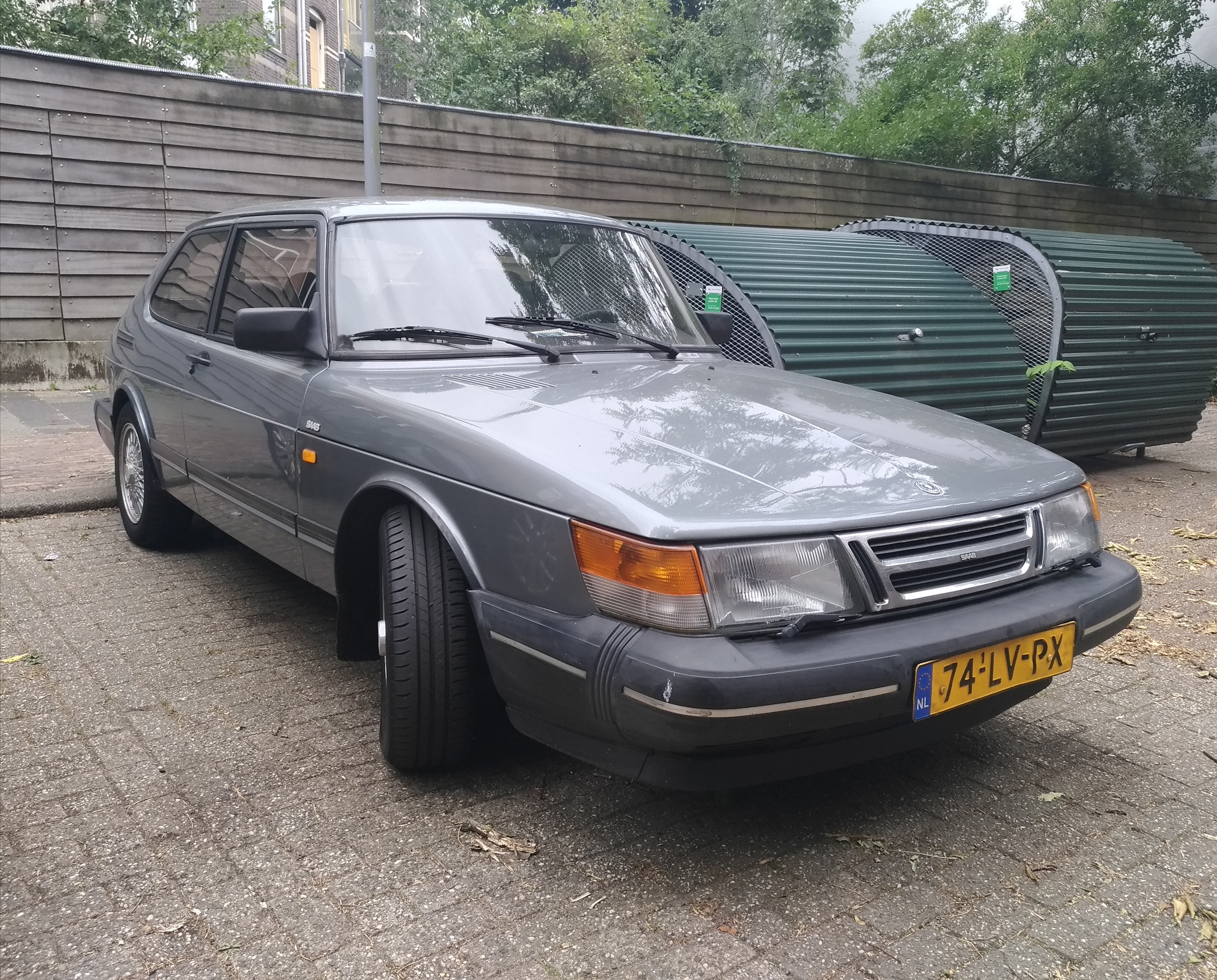 1990 Saab 900 S (2.0 141 hp) at Rotterdam